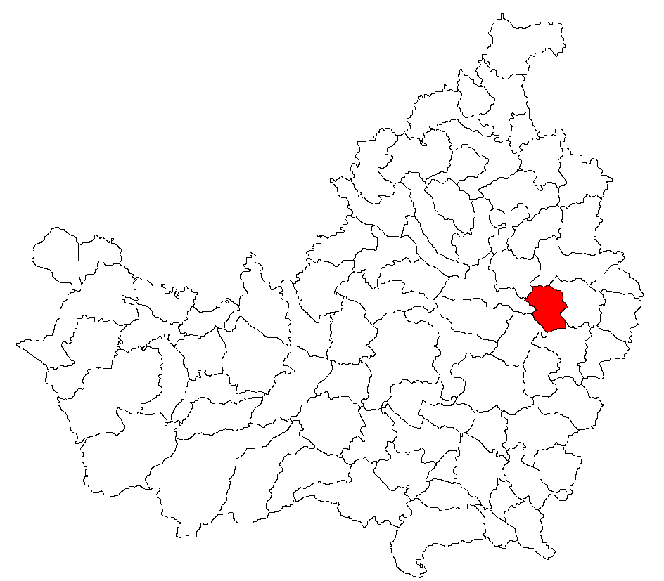 Categorie:Hărţi ale judeţului Cluj